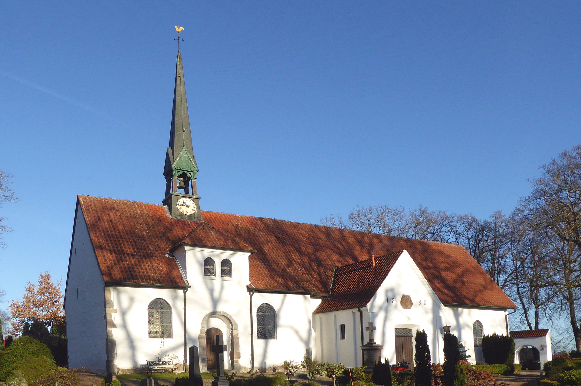 Ulsnis romanische St. Wilhadi-Kirche aus den 12. Jahrhundert. Im Jahr 1338 dem heiligen Sankt Wilhadus (missionierender angelsächsischer Geistlicher) gewidmet. Bauwerk aus Feldstein- und Tuffsteinmauerwerk, Vorderseite jedoch leider großflächig massiv verputzt. Rückseitig eine Backsteinreparatur gewollt sichtbar. Foto 2018 Wolfgang Pehlemann P1280459